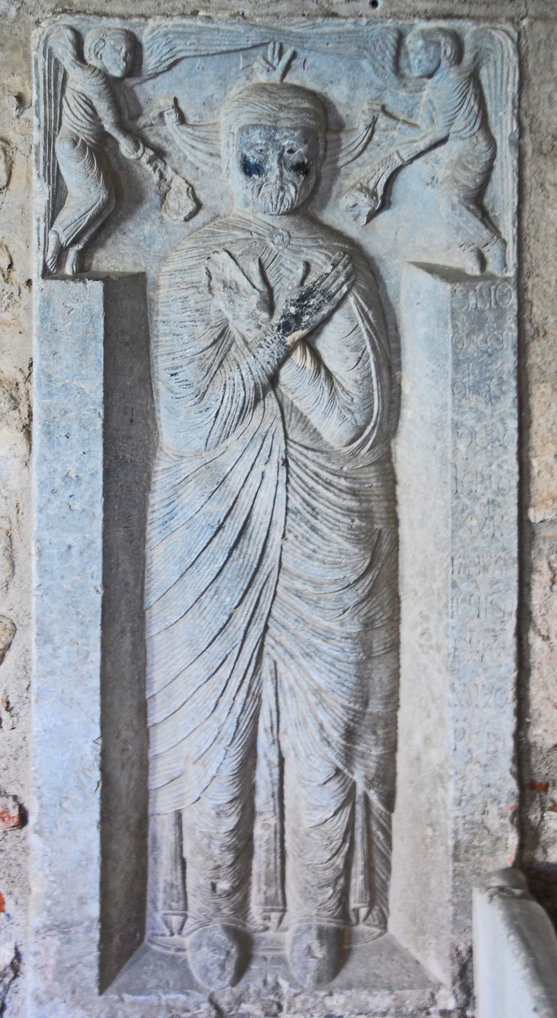 Ste-Eulalie-et-Ste-Julie_d’Elne, Grabmal eines Bischofs, Südgalerie